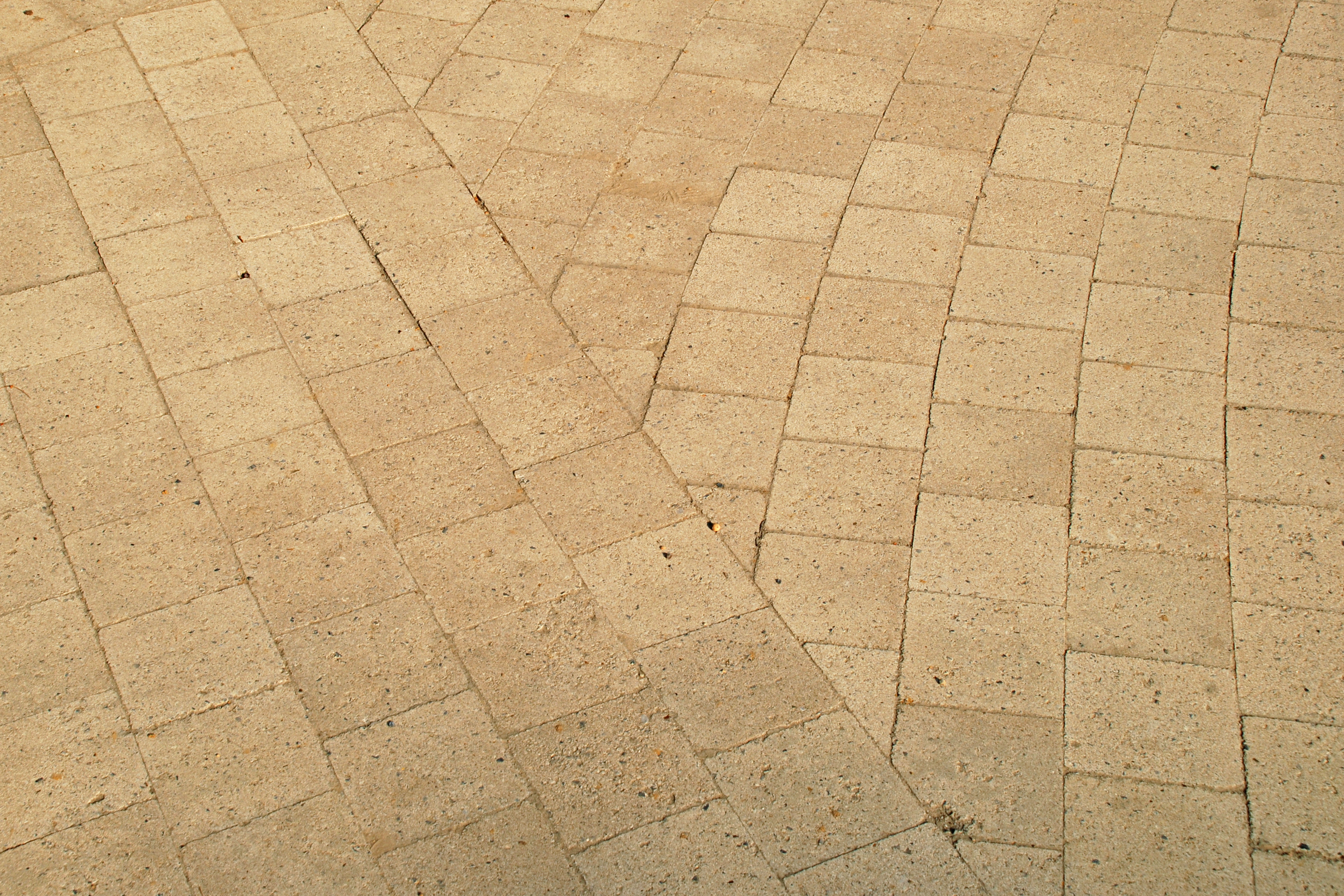 Belgique - Brabant wallon - Louvain-la-Neuve - Cyclotron - pavés « Blanc de Bierges »